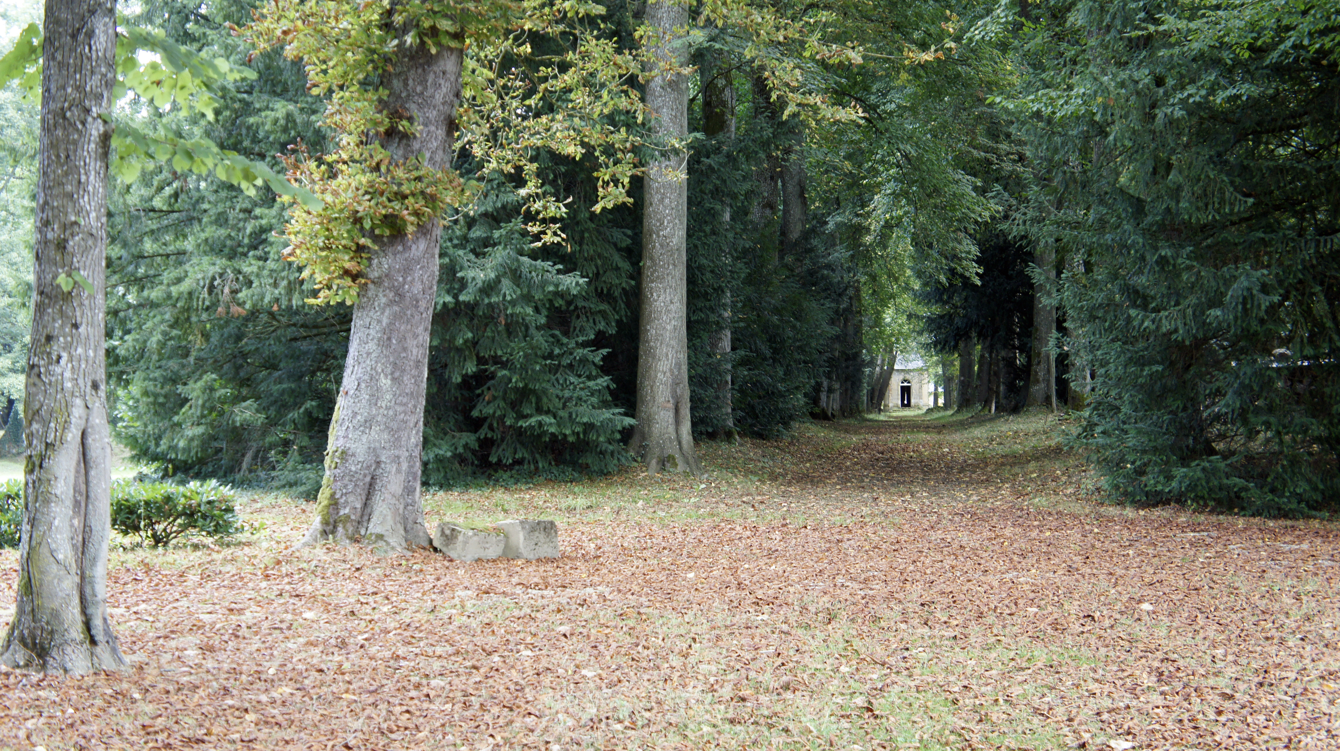 Le parc du château de Bazeilles .